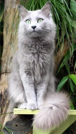 Nebelung male Aleksandr van Song de Chine